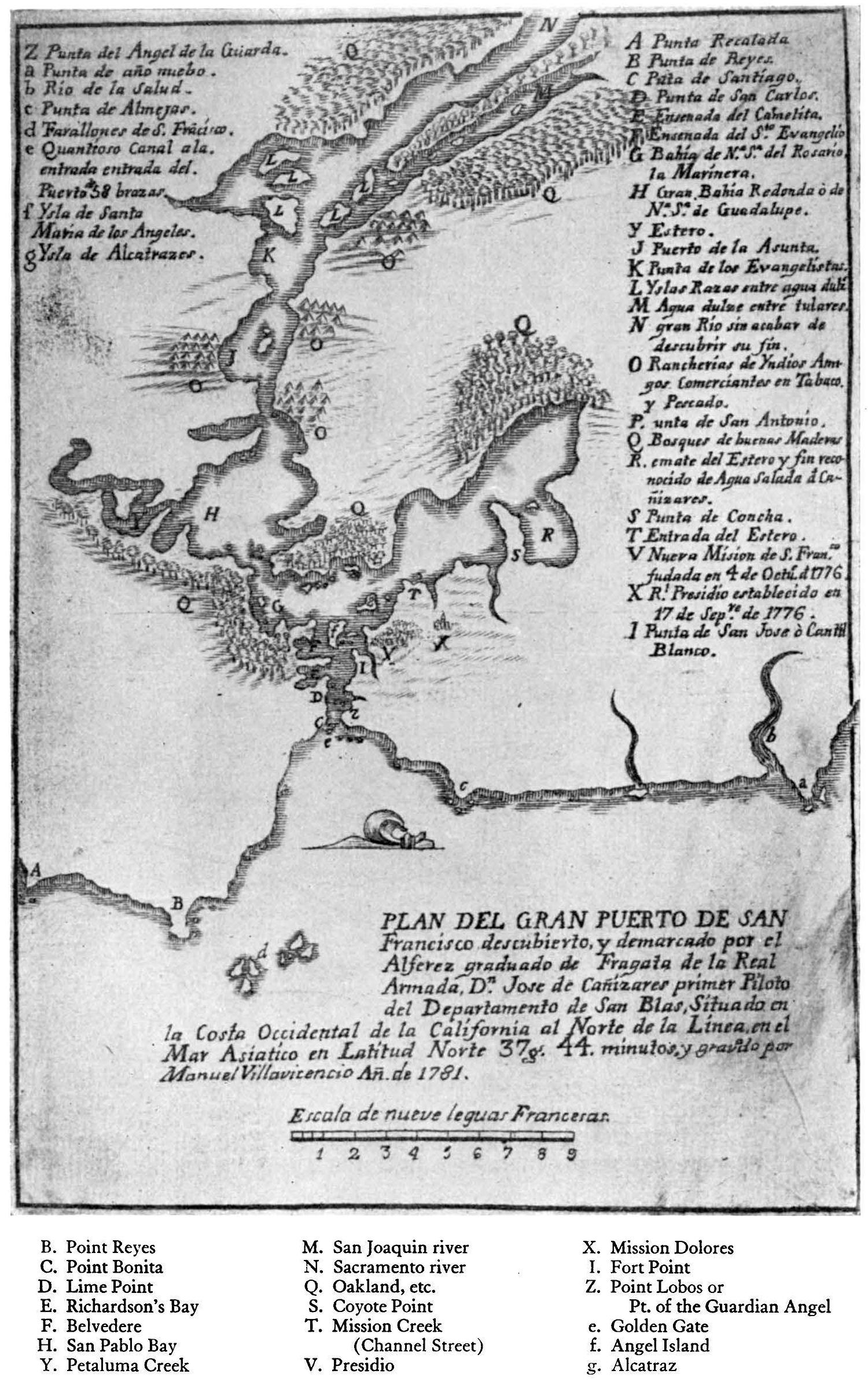 1781 Cañizares Map of San Francisco Bay